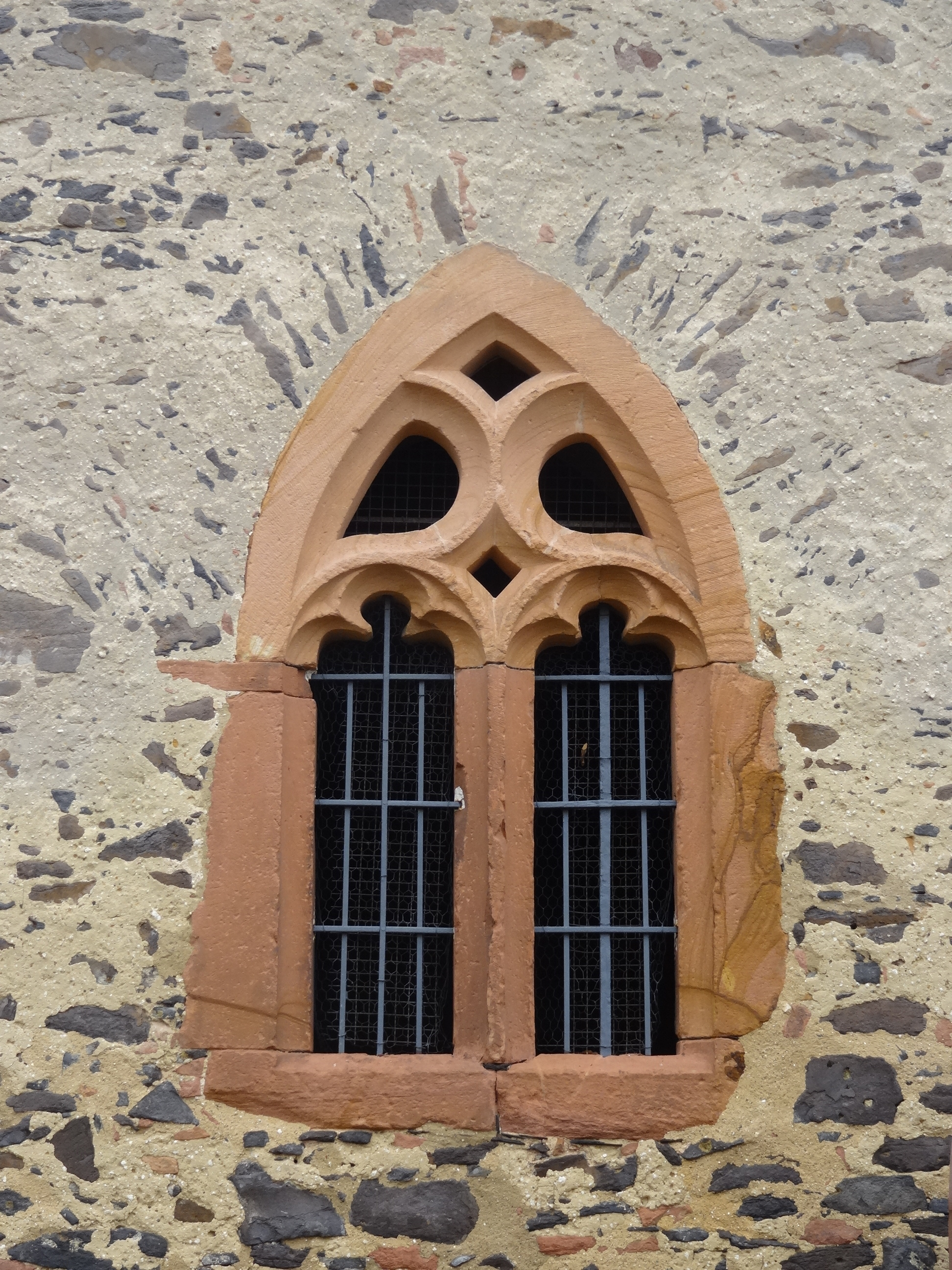 Johanniter-Turm Nidda